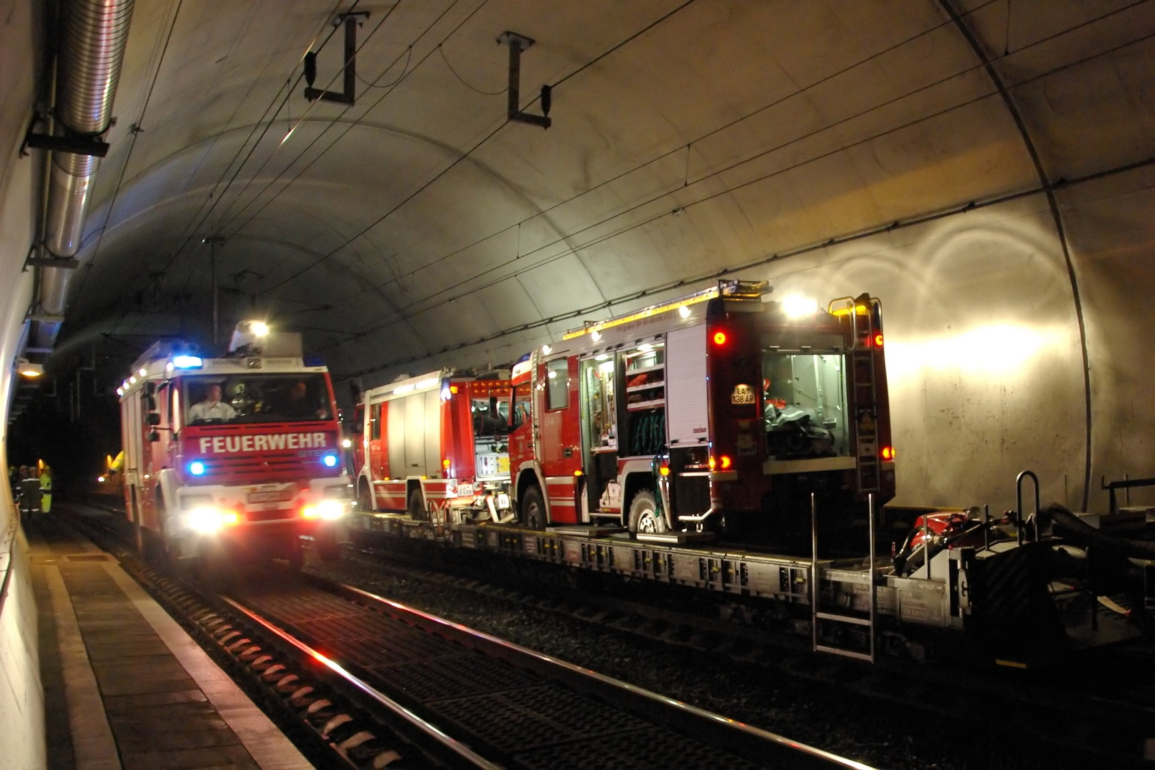 Probealarm im Zammer Tunnel mit den Feuerwehren Landeck und Zams